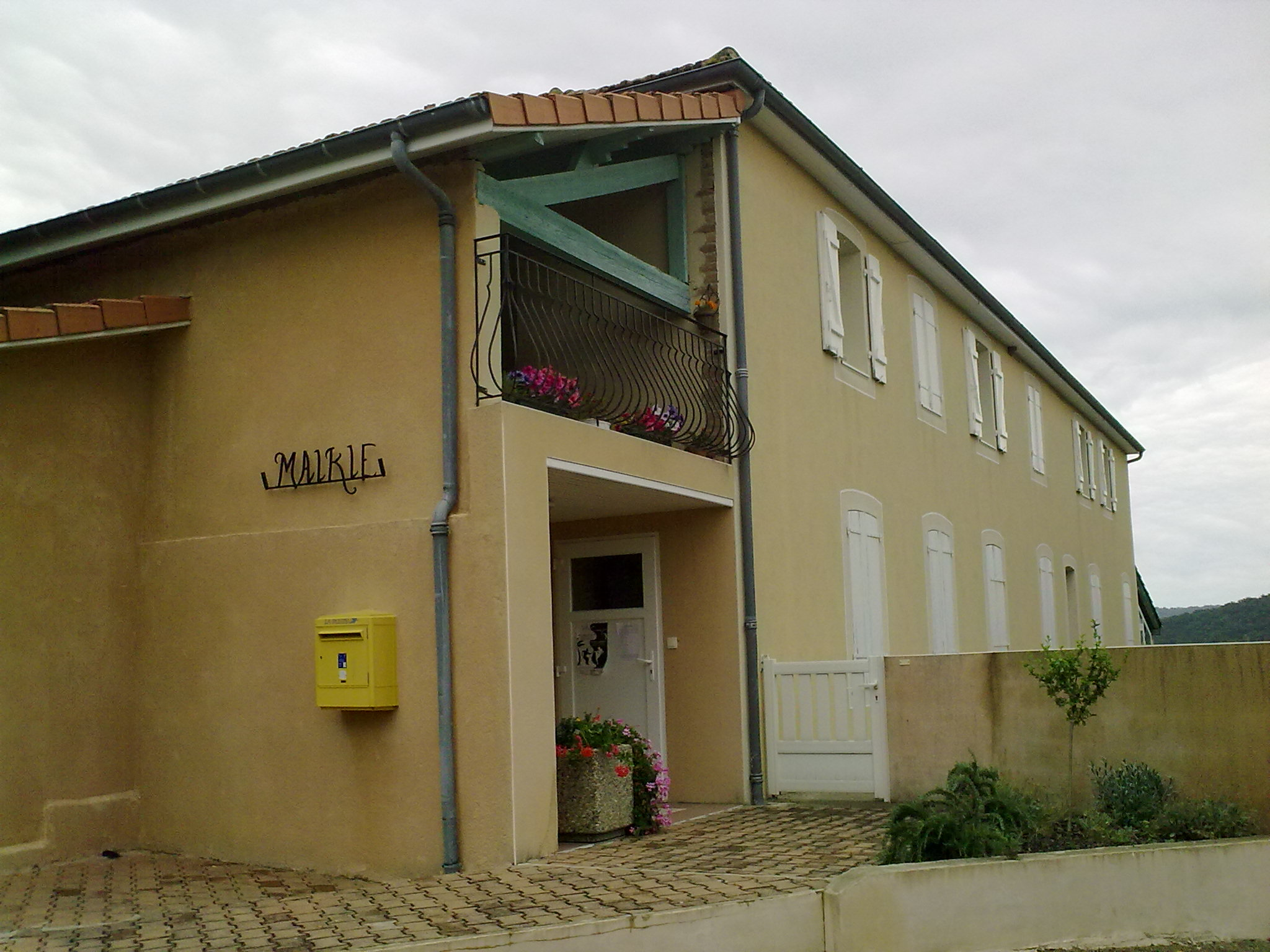 Ségos